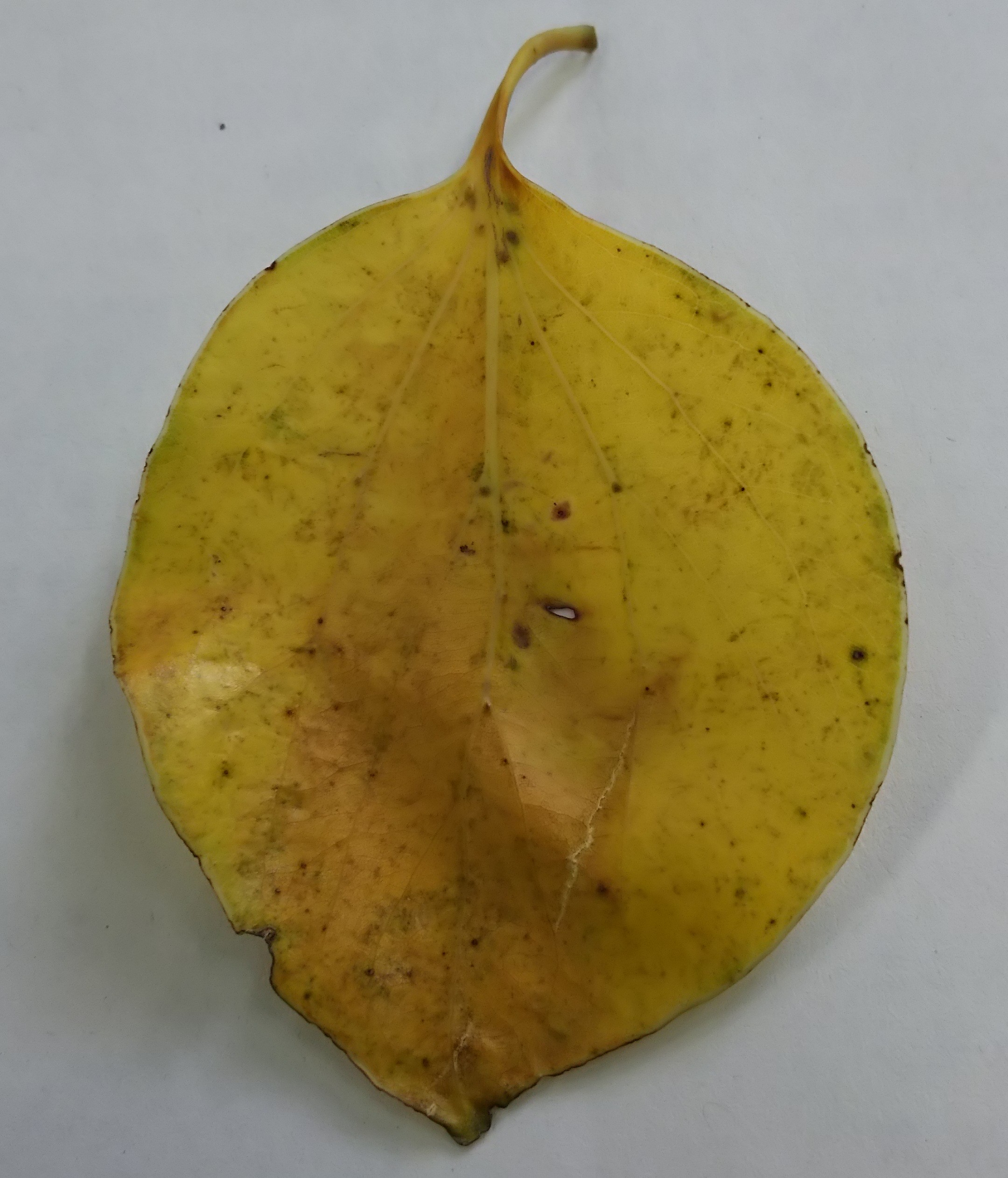 マルバグス(Cinnamomum camphora var. rotundifolia Makino)の葉